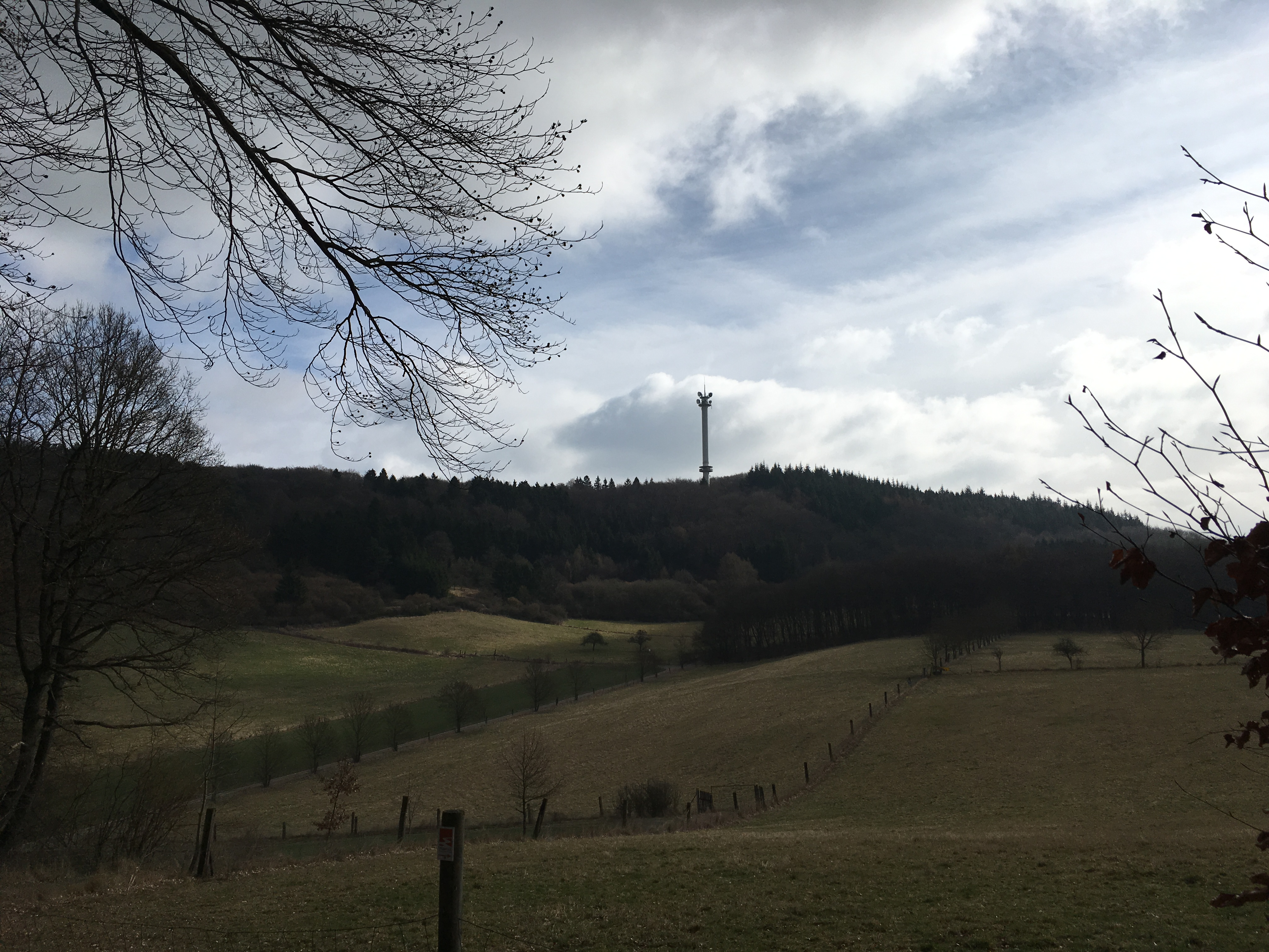 Der Waldseepfad Rieden ist ein rund 14 km langer Rundwanderweg in Rieden, Landkreis Mayen-Koblenz in Rheinland-Pfalz. Er ist einer von 26 Prädikatswanderwegen, die als Traumpfade vermarktet werden. Hinten Richtfunkturm Gänsehals auf dem Gänsehals.